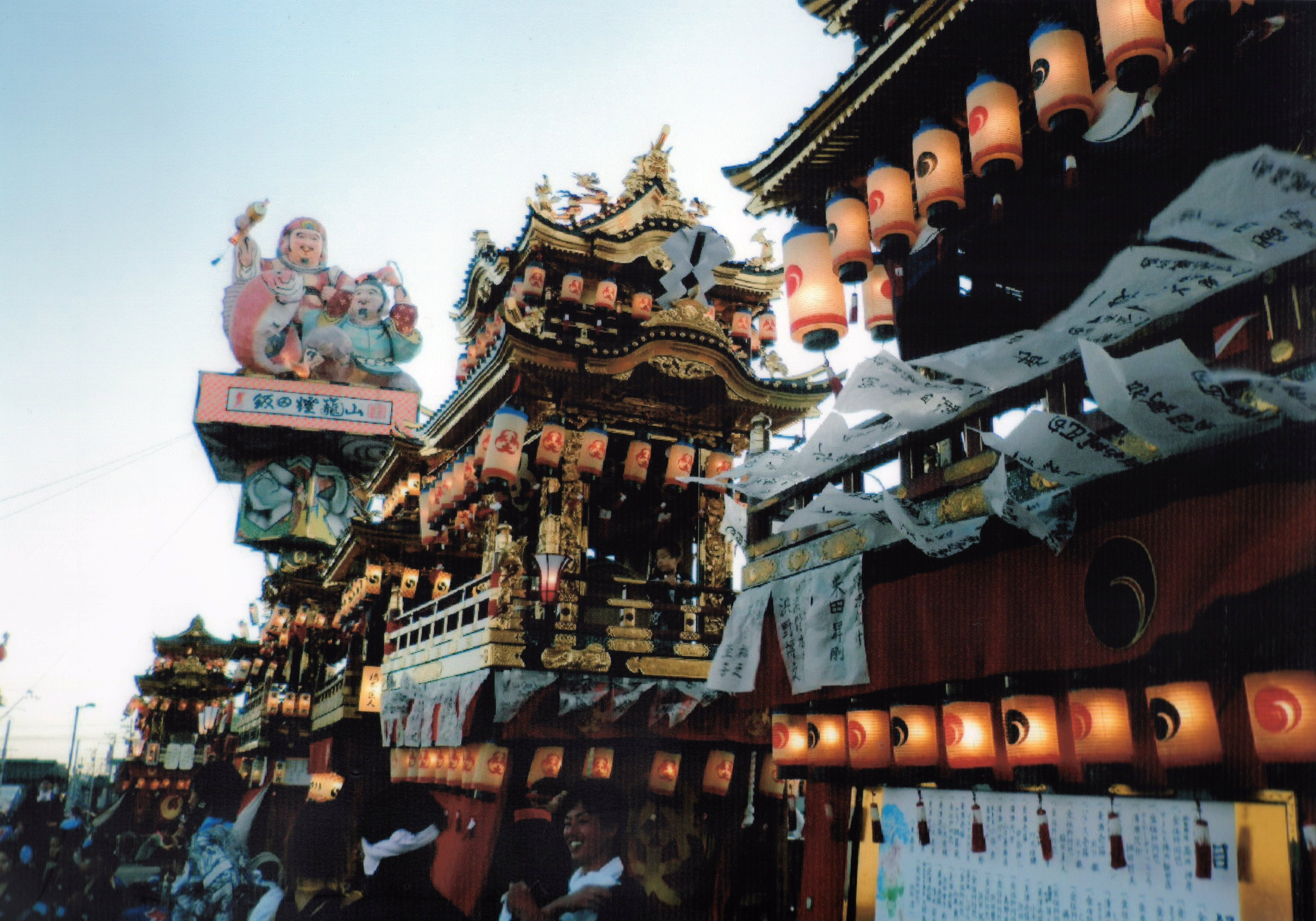 石川県珠洲市飯田町で7月20日・21日に開催される祭りです。詳細はwebで